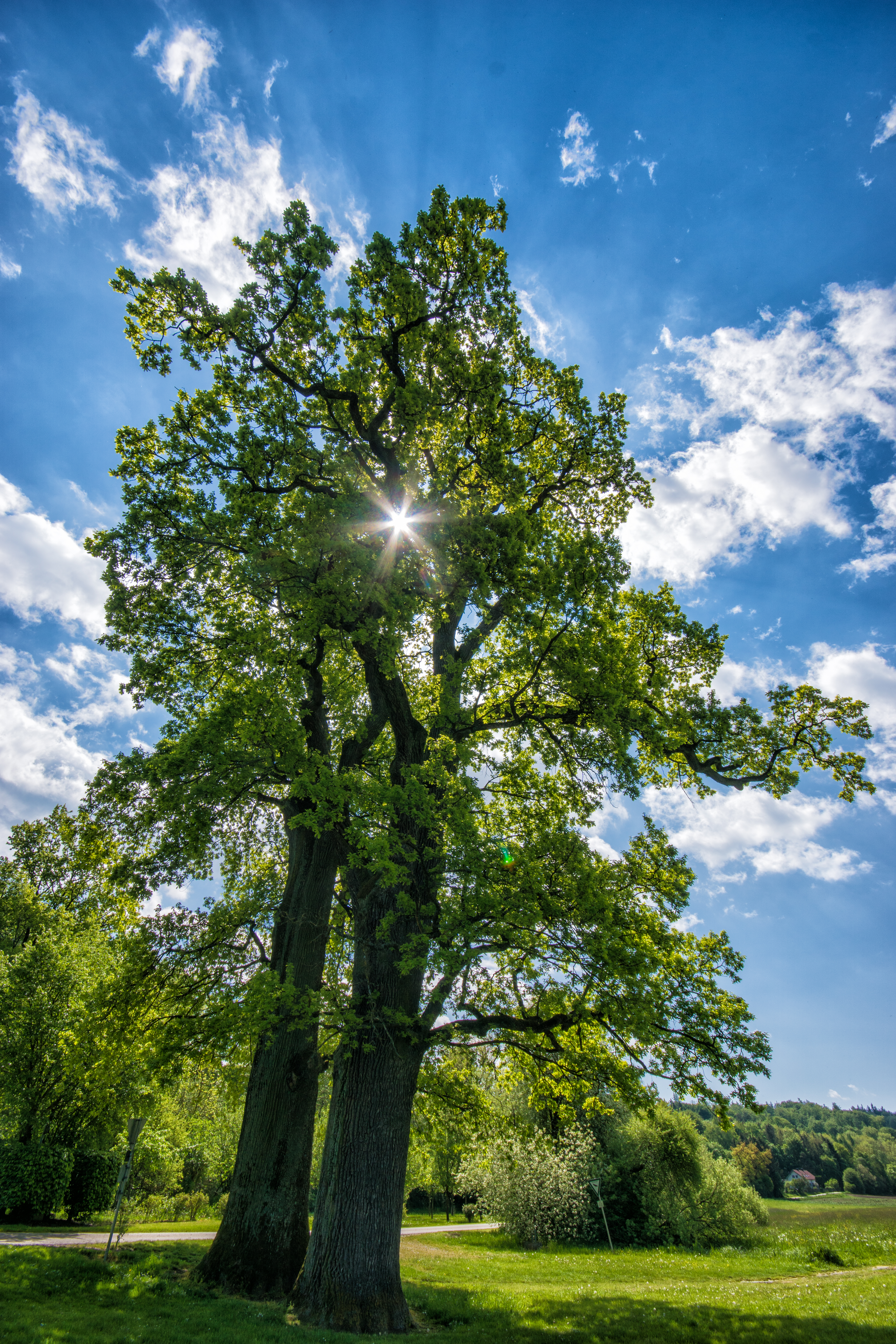 Südlich des Zellhofs im Gebiet der Amperauen zwischen Schöngeising und Fürstenfeldbruck befinden sich diese ca. 300 Jahre alten Eichen, die aufgrund ihres Alters und ihrer Schönheit 1988 vom Landratsamt Fürstenfeldbruck als Naturdenkmal unter besonderen Schutz gestellt wurden. Sie bieten einer großen Anzahl von Insekten, Vogelarten und Baumfledermäusen, welche Spechthöhlen nutzen, unterschiedlichste Lebensräume.